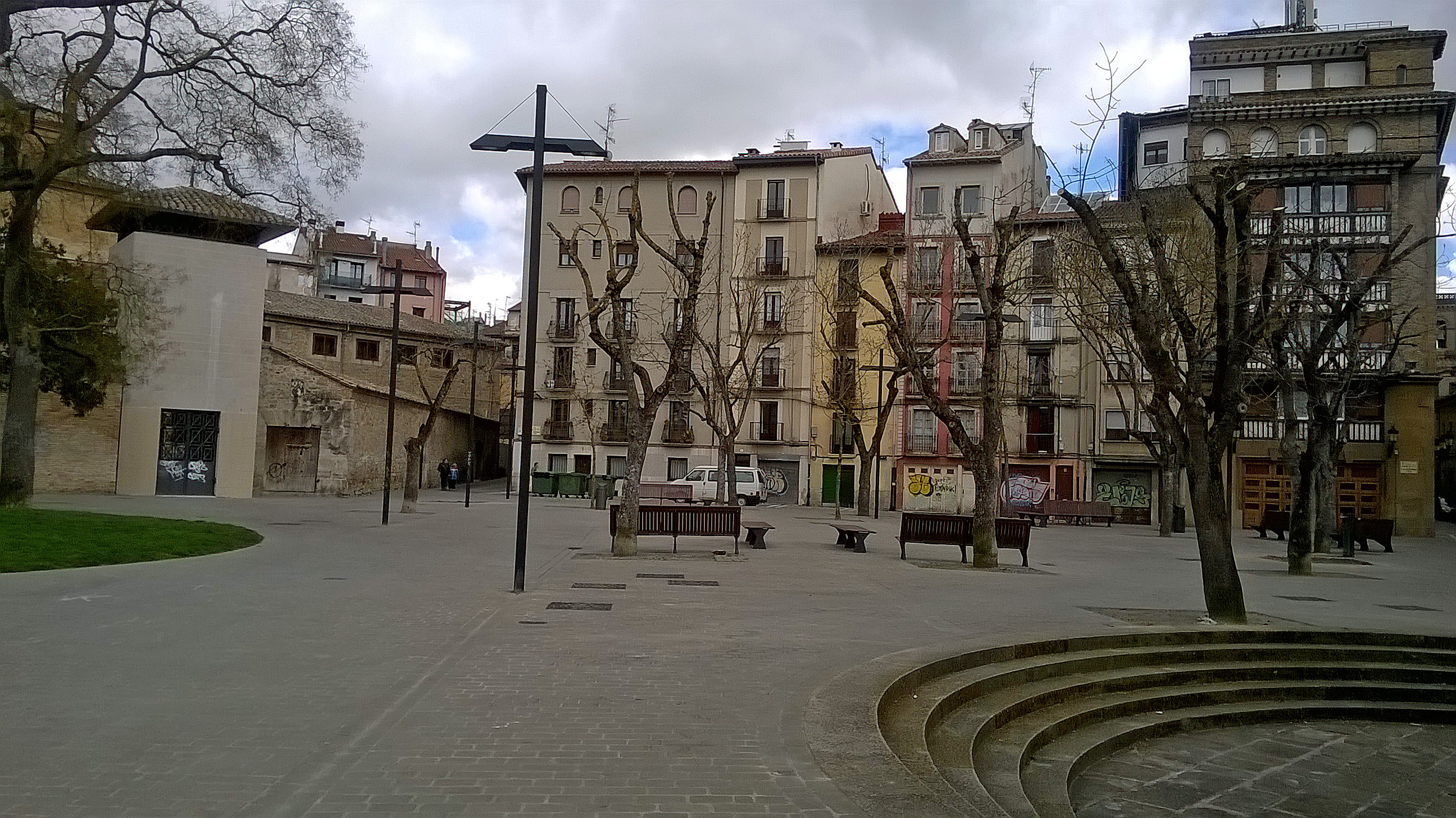 O-ko Andre Maria plaza, Iruñea, Nafarroa, Euskal Herria